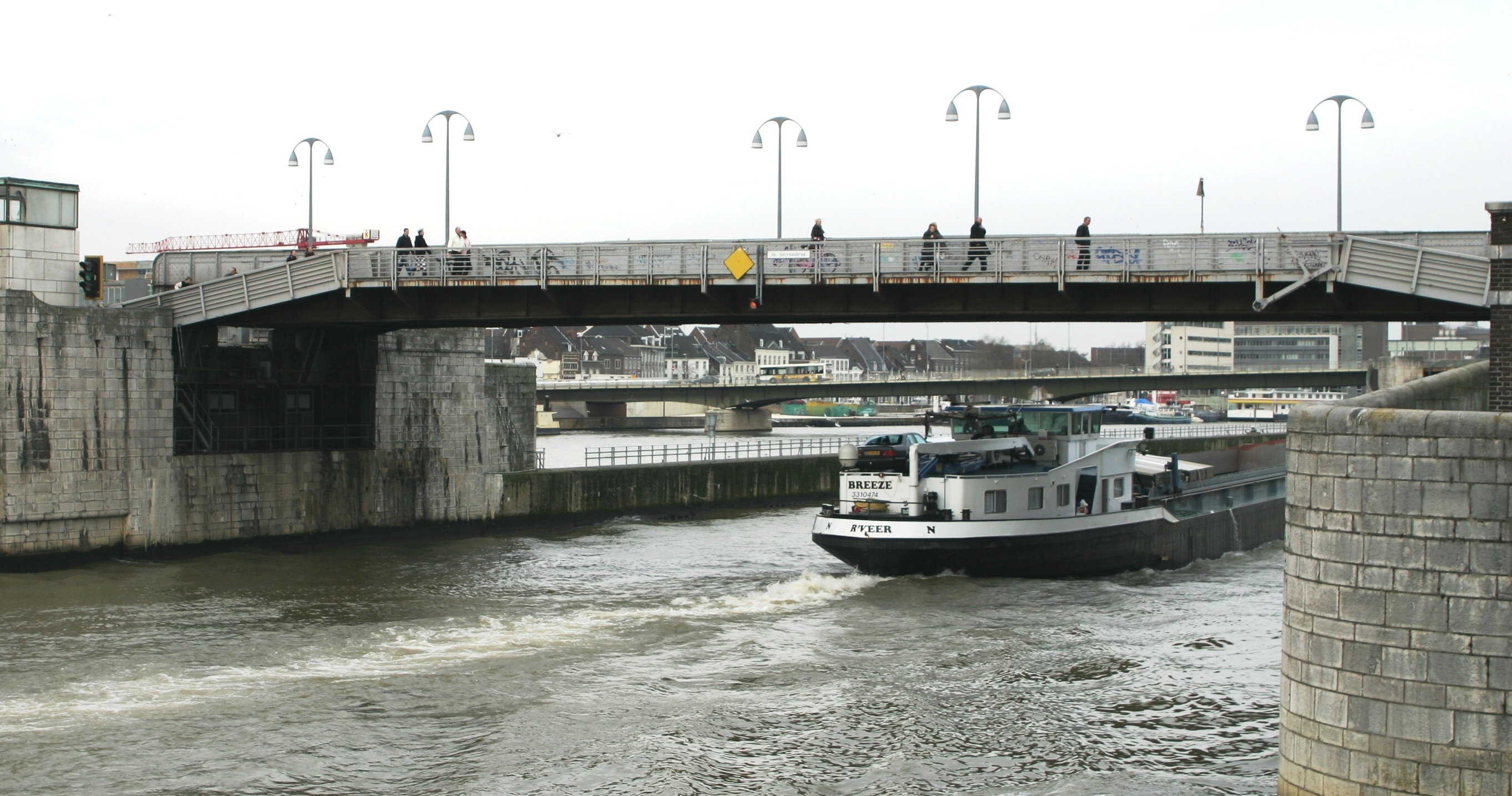 Sint Servaashiefbréck an der Luccht bei der duerchfaart vun engem Schëff.